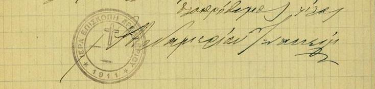 Печат на ардамерския епископ